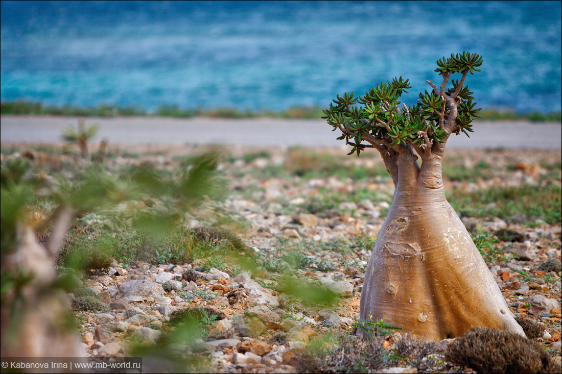 Adenium obesum subsp. socotranum (?)Dorstenia sp.?